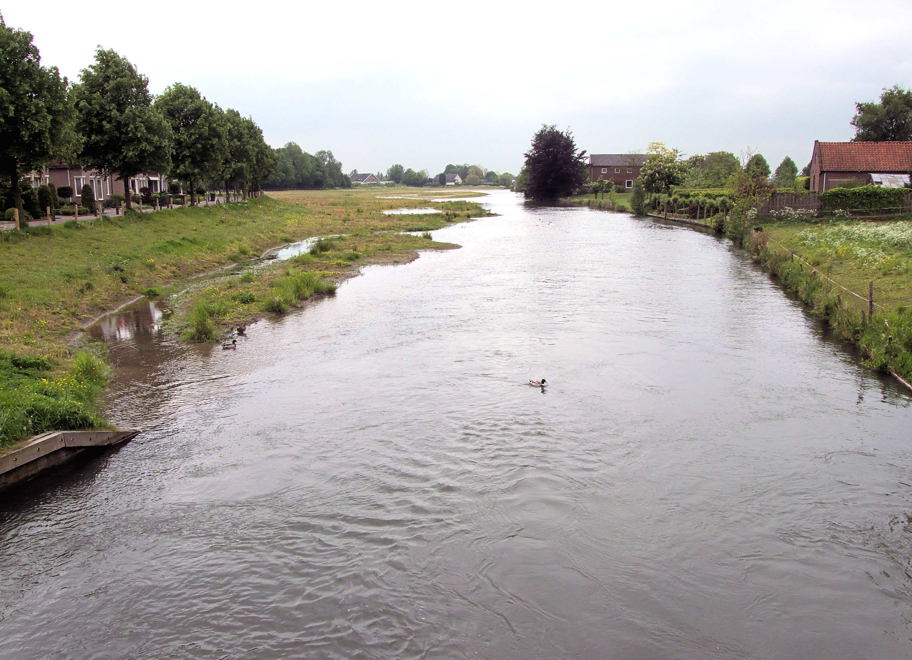 Kromme Rijn bij Cothen: begin meanderend gedeelte